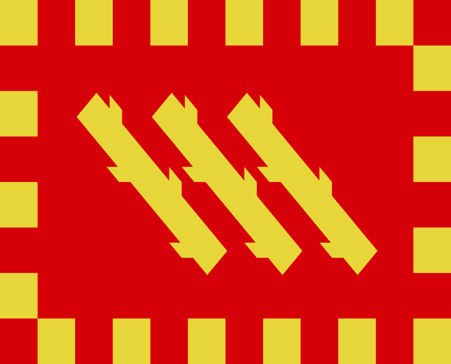 Flag of Catalan comarca Pallars Sobirà (from Catalan Wikipedia)